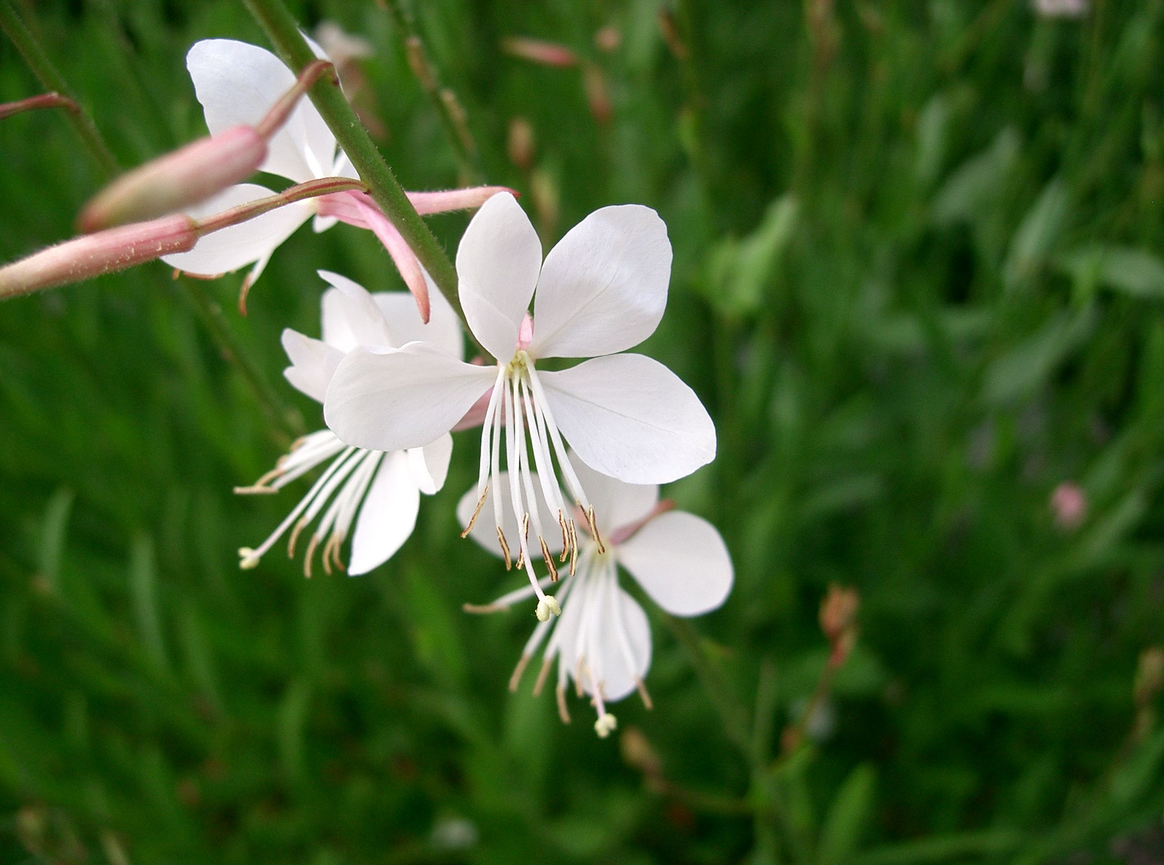 Gaura lindheimeri